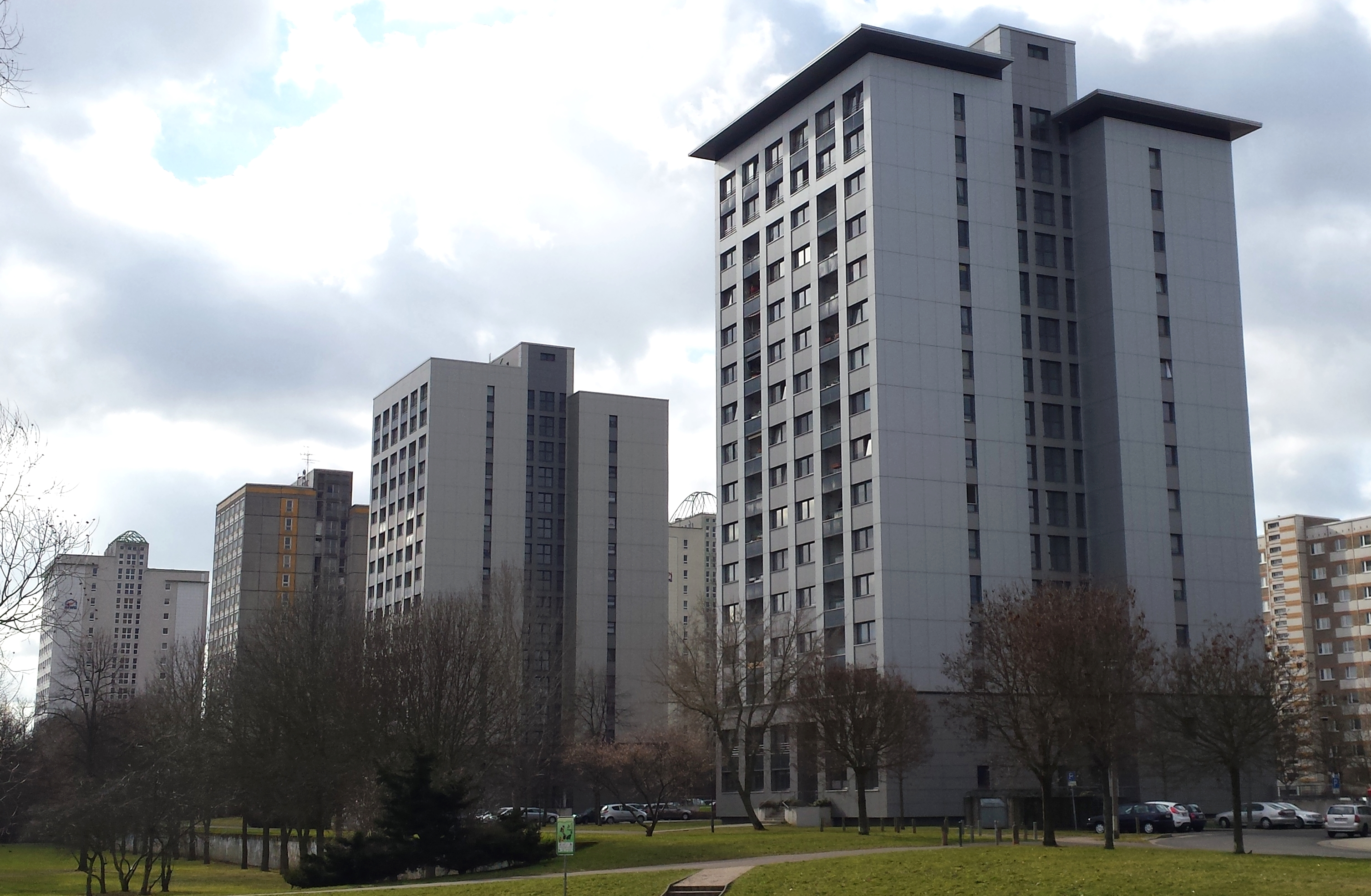 Hochhäuser (16-Geschosser) am Neustädter See, Magdeburg